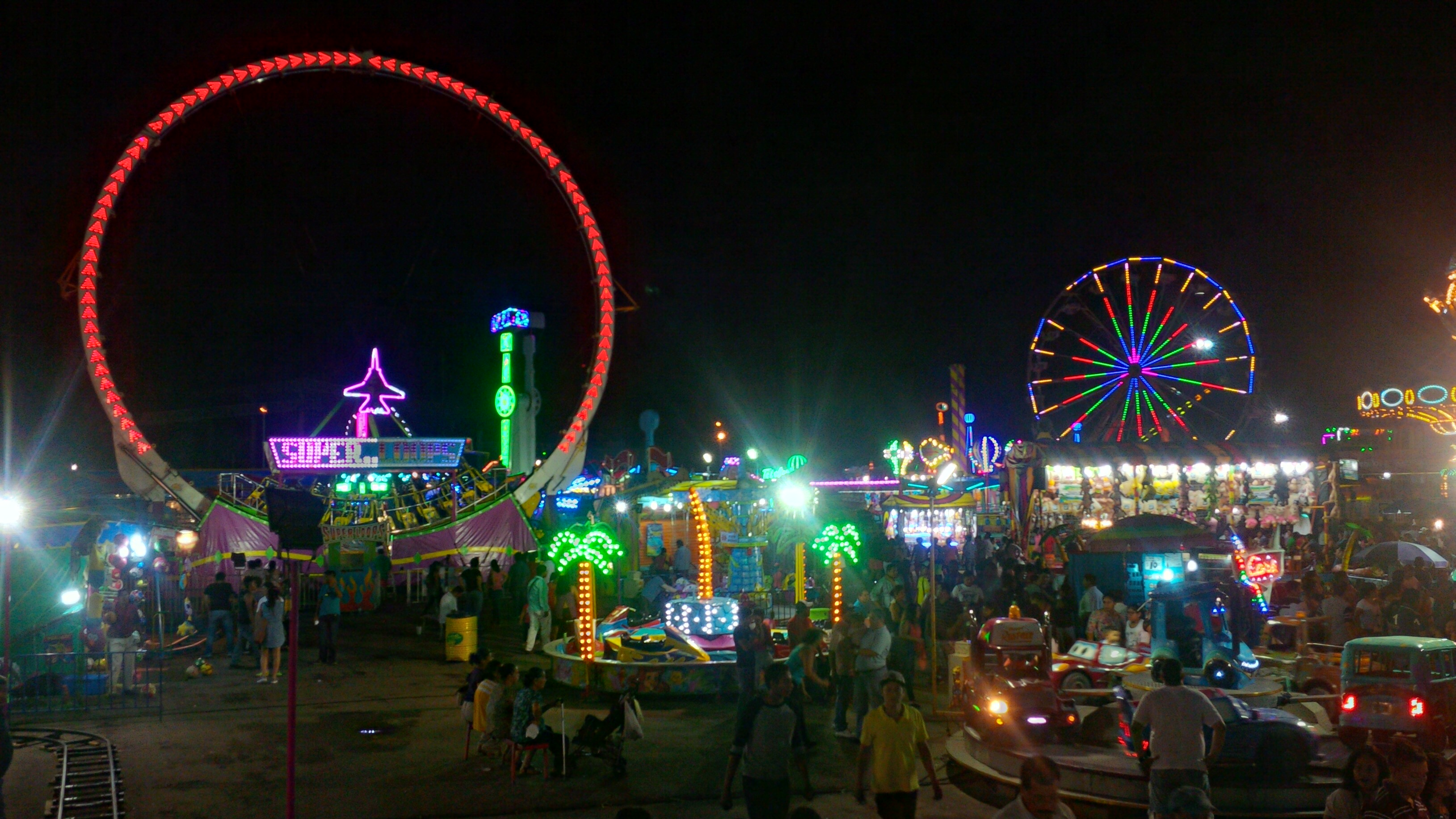 Juegos mecánicos durante la Feria Tabasco. Una de las tres ferias más importantes de México. Villahermosa, Tabasco, México.